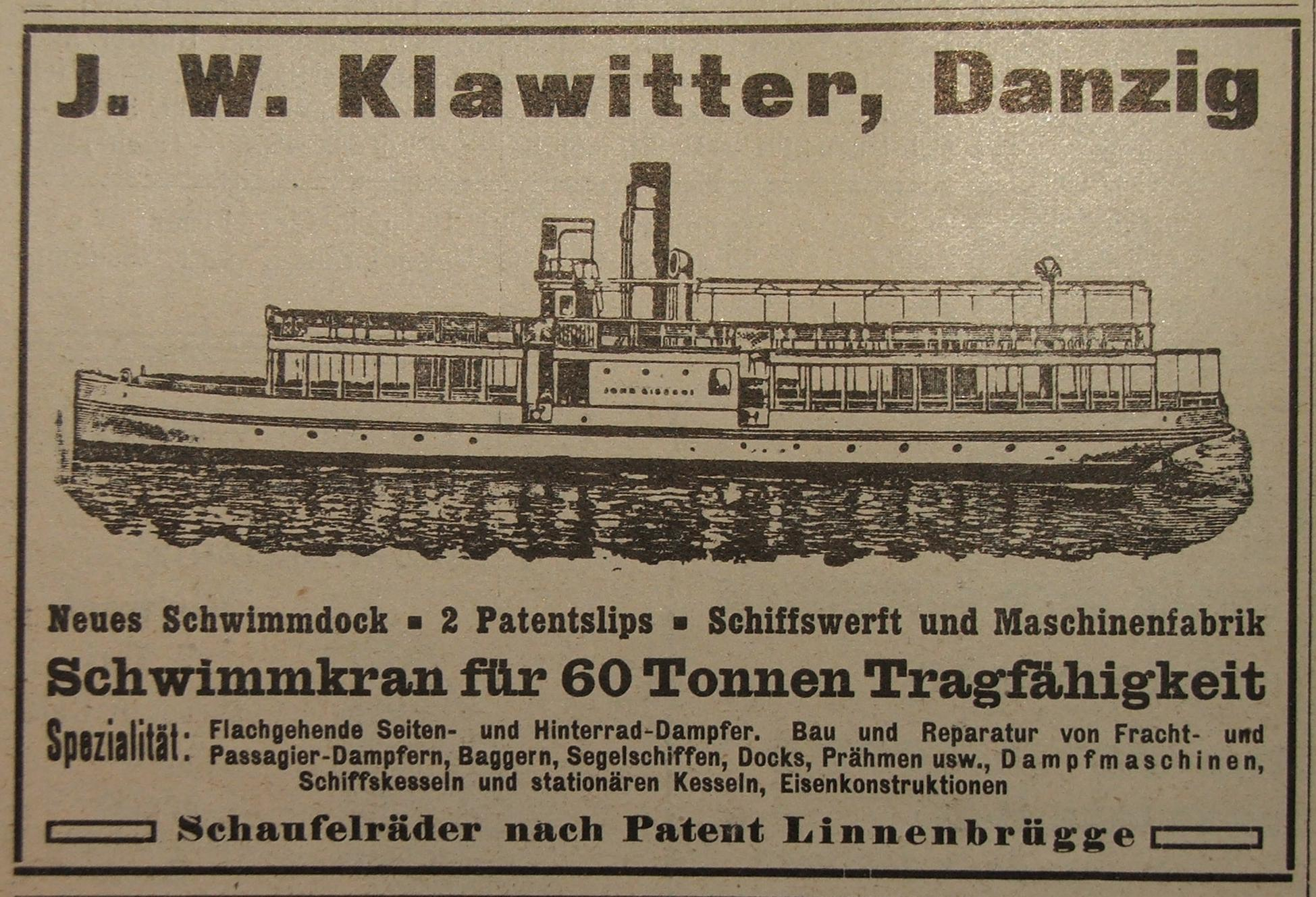 Werbeanzeige J.W.Klawitter Werft (in Danzig) in der Fachzeitschrift "Hansa" von 1913